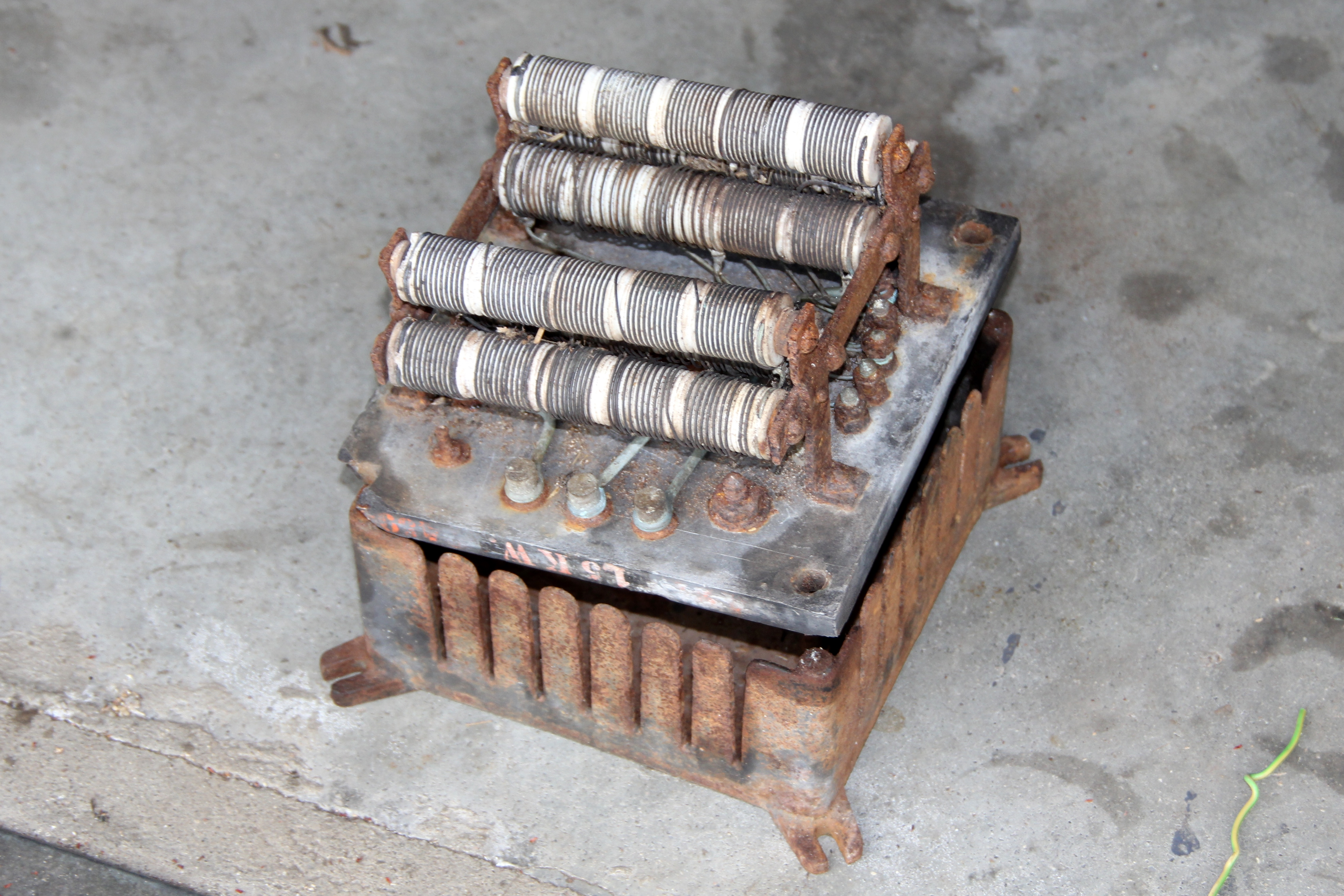 Defekter Anlasswiderstand für Schleifringläufermotoren bis 1,5kW von Bergmann Berlin (später Bergmann Borsig), etwa 1920er-Jahre. Das Gerät wurde geöffnet, die Wicklungskörper aus Porzellan mit den Widerstandsdrähten sind gut zu erkennen.